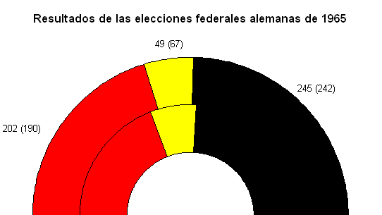 Imagen creada por user:Willhsmit como Image:1965 federal german result.png con licencia de dominio publico. El titulo fue modificado al español.